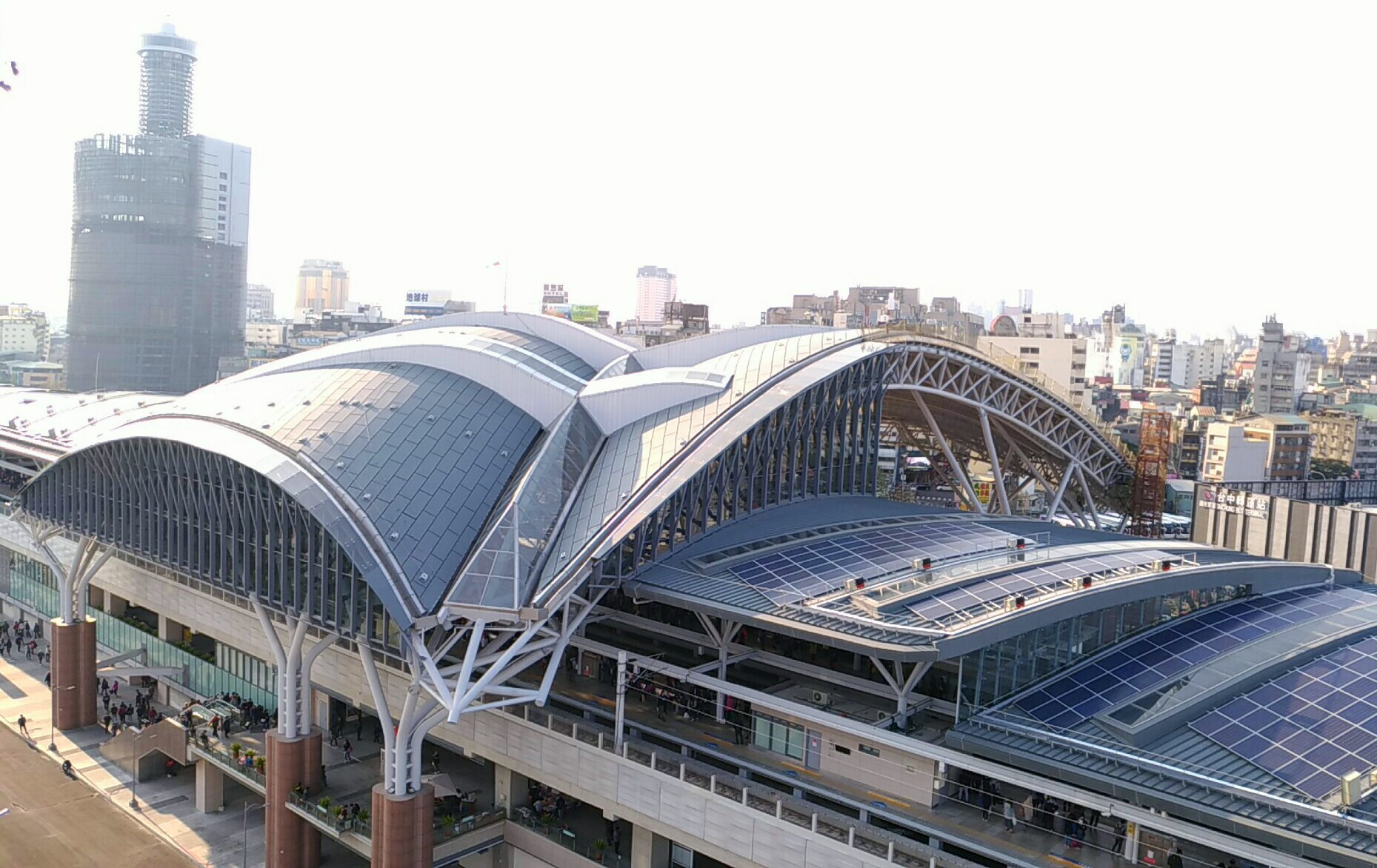 中文（台灣）: 臺灣鐵路管理局臺中車站東站方向，2017年2月工程情況。